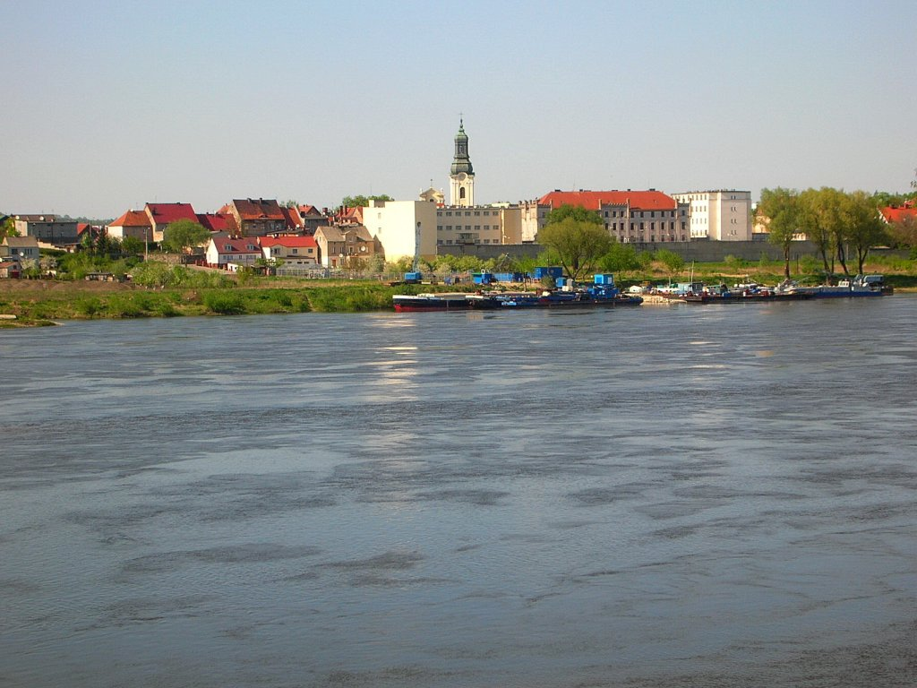 Kościół św Mikołaja w Bydgoszczy